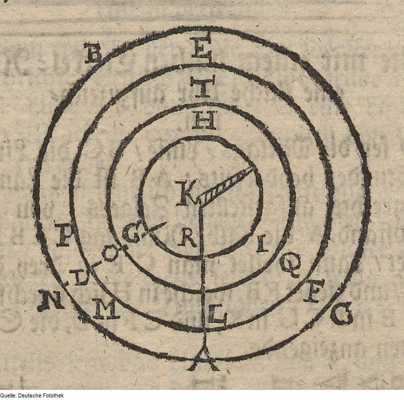 Original image description from the Deutsche Fotothek Astronomie & Uhr & Sonne